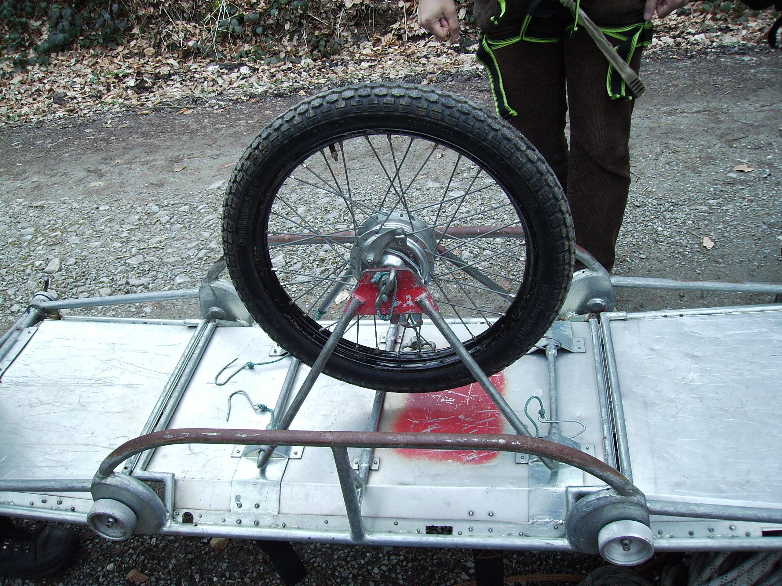 Radsatz an einer Gebirgstrage (noch nicht alle Sicherungssplinte montiert) Wheel on a Mountain Rescue stretcher (safety pins not yet complete)